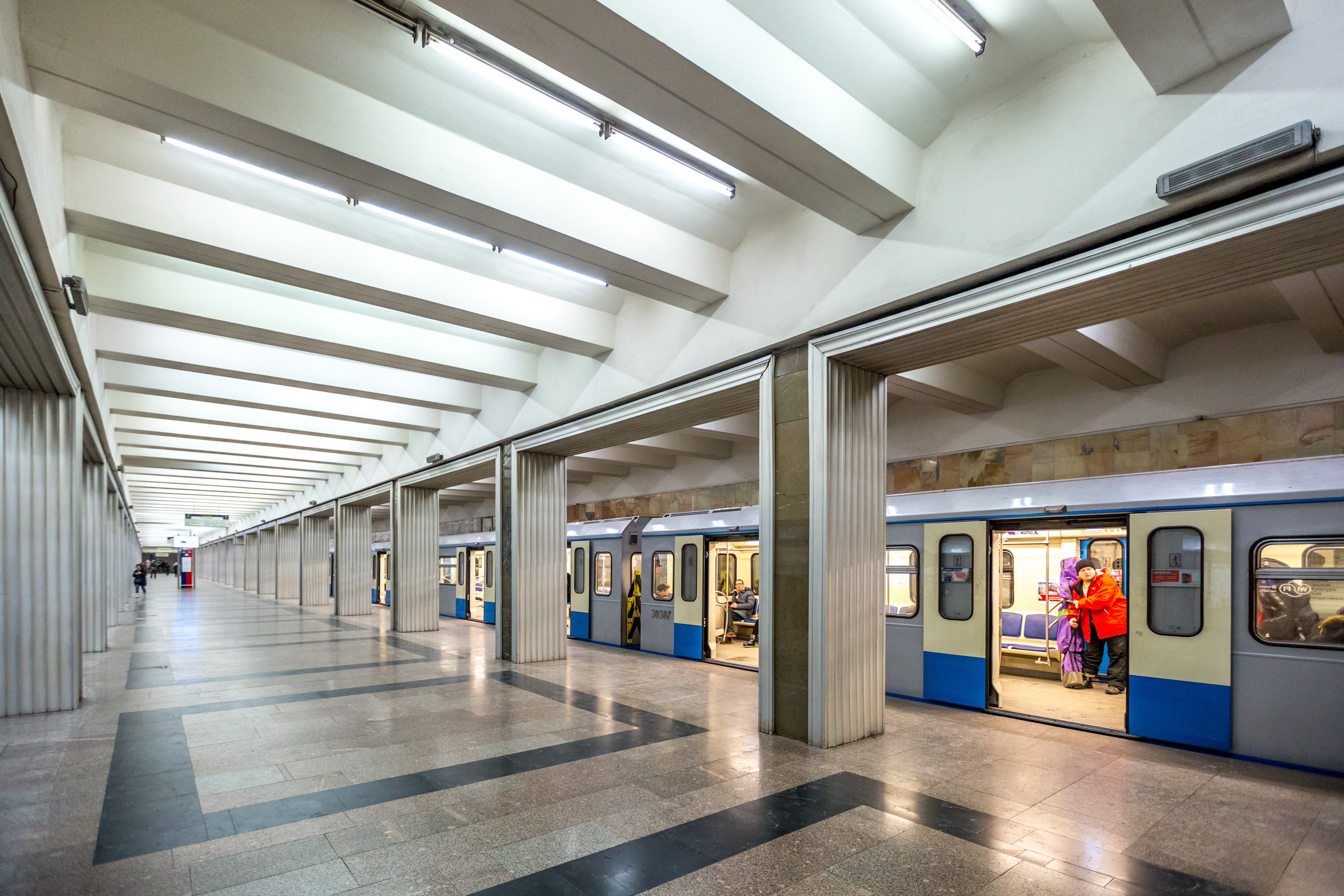 Нагорная (станция метро)